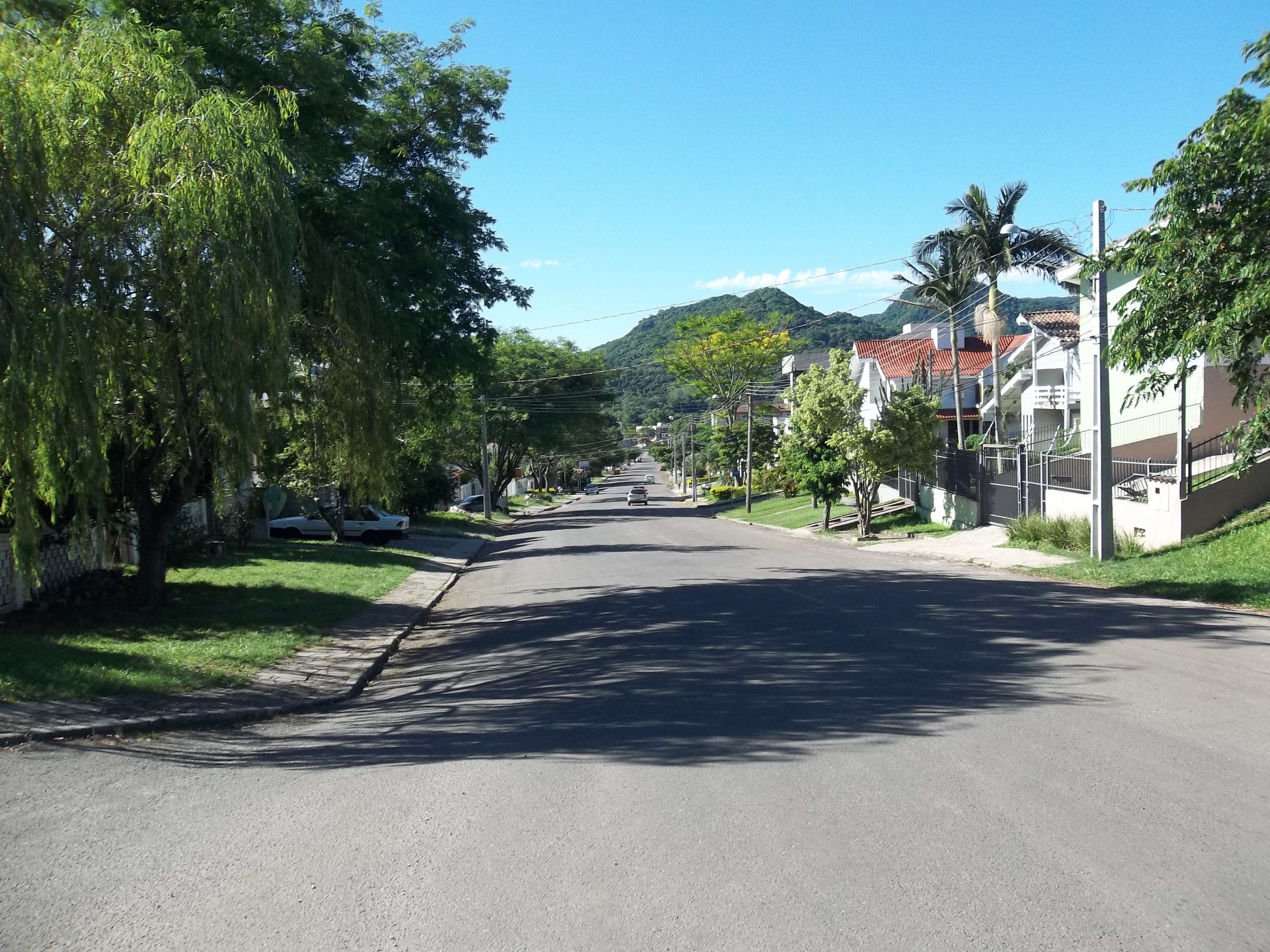 Rua Antônio Botega. São José, Sede, Santa Maria, Rio Grande do Sul, Brasil.